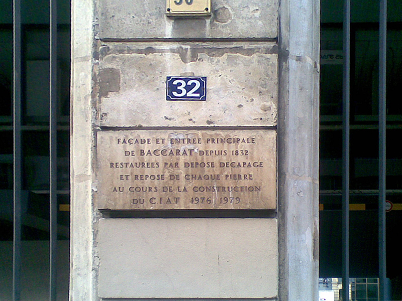 Plaque Baccarat rue de Paradis - Paris 10e